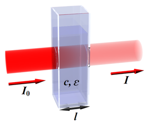 Spektrofotometria